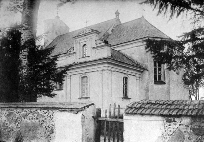 Беларуская (тарашкевіца): Геранёны (Gieraniony)